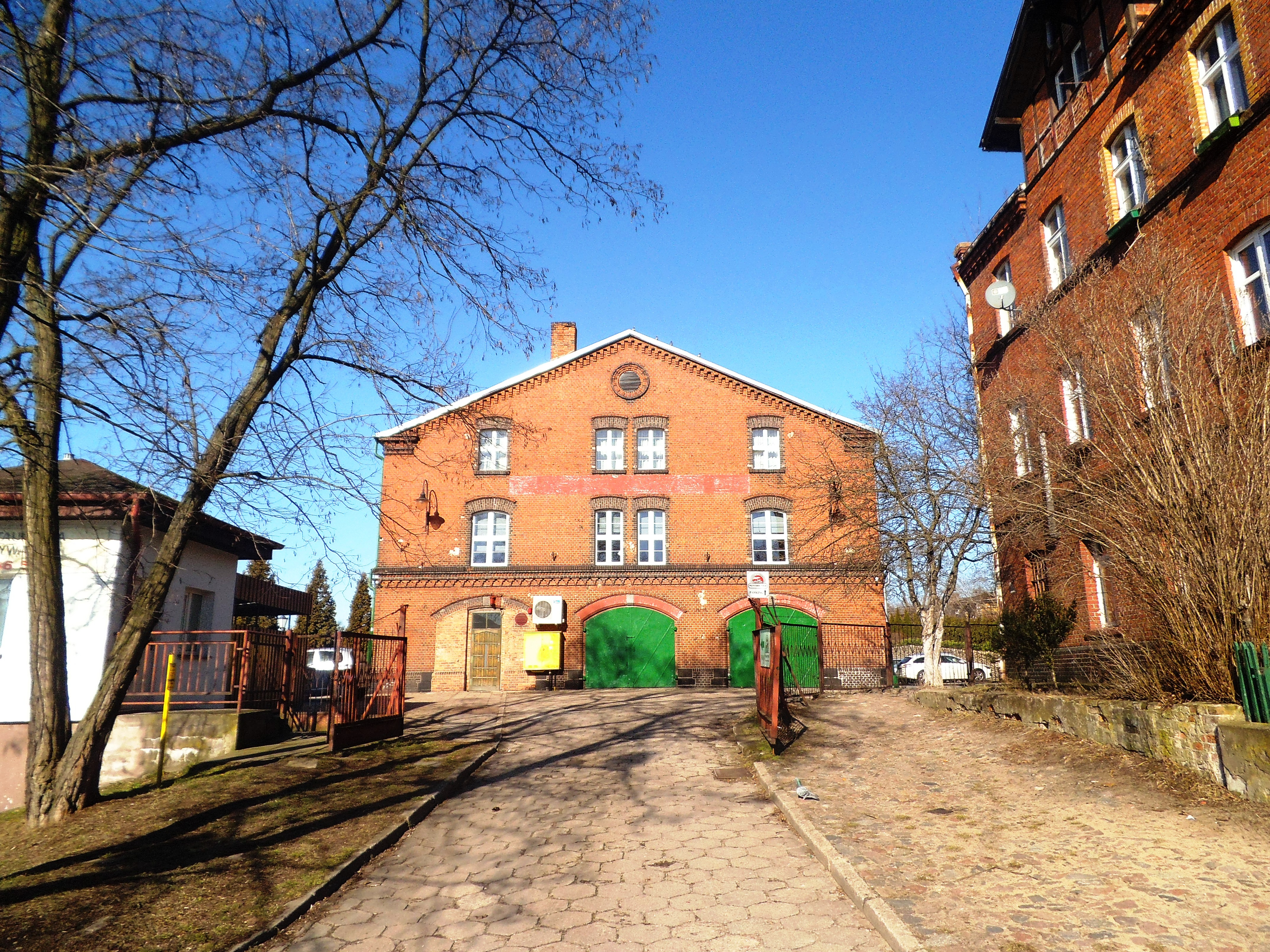 Hostel Przystanek Toruń